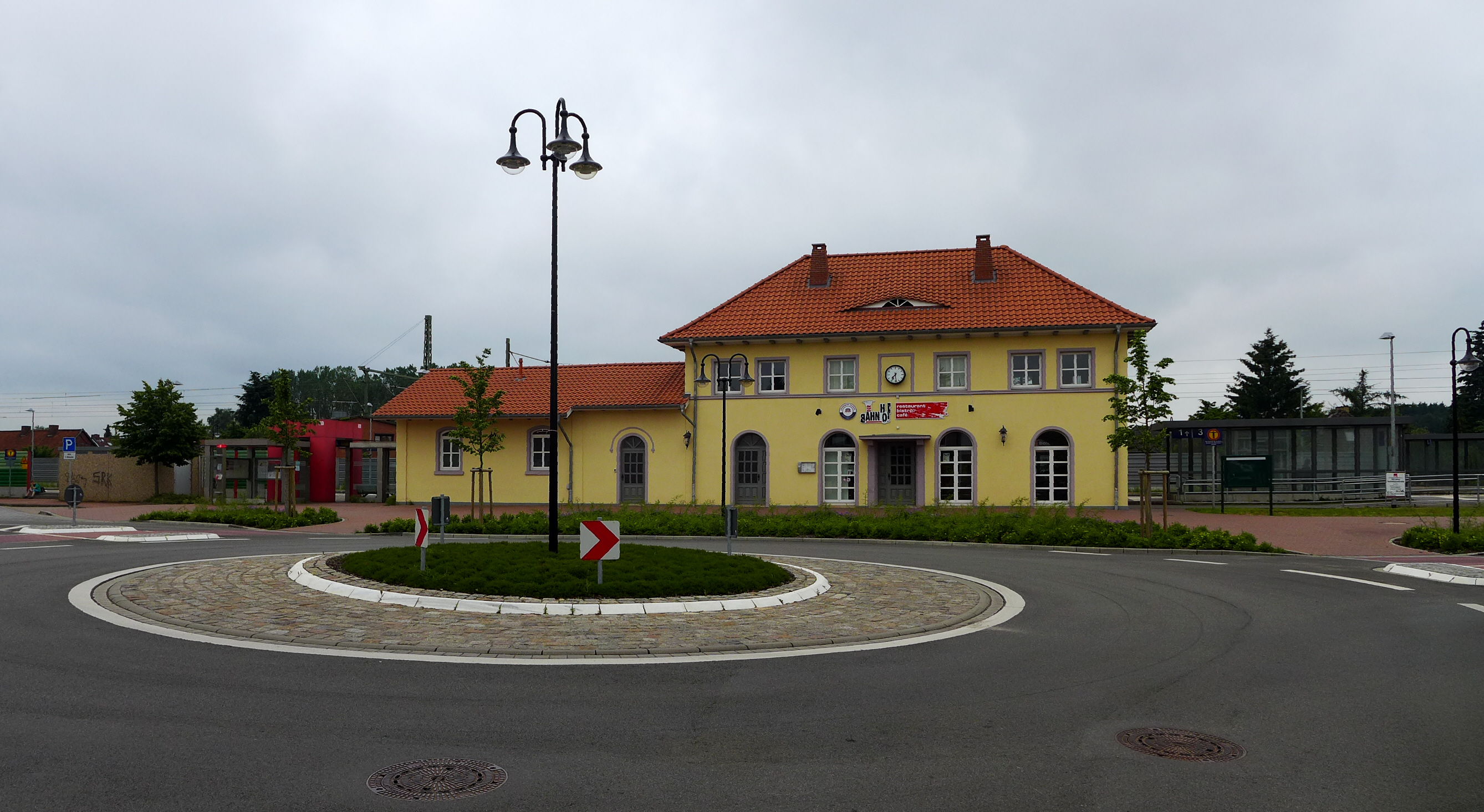 Bahnhof in Bienenbüttel, Haltepunkt des Metronom an der Hochgeschwindigkeitseisenbahnstrecke Hamburg–Uelzen–Hannover. Kreisverkehr vor dem Bahnhof.